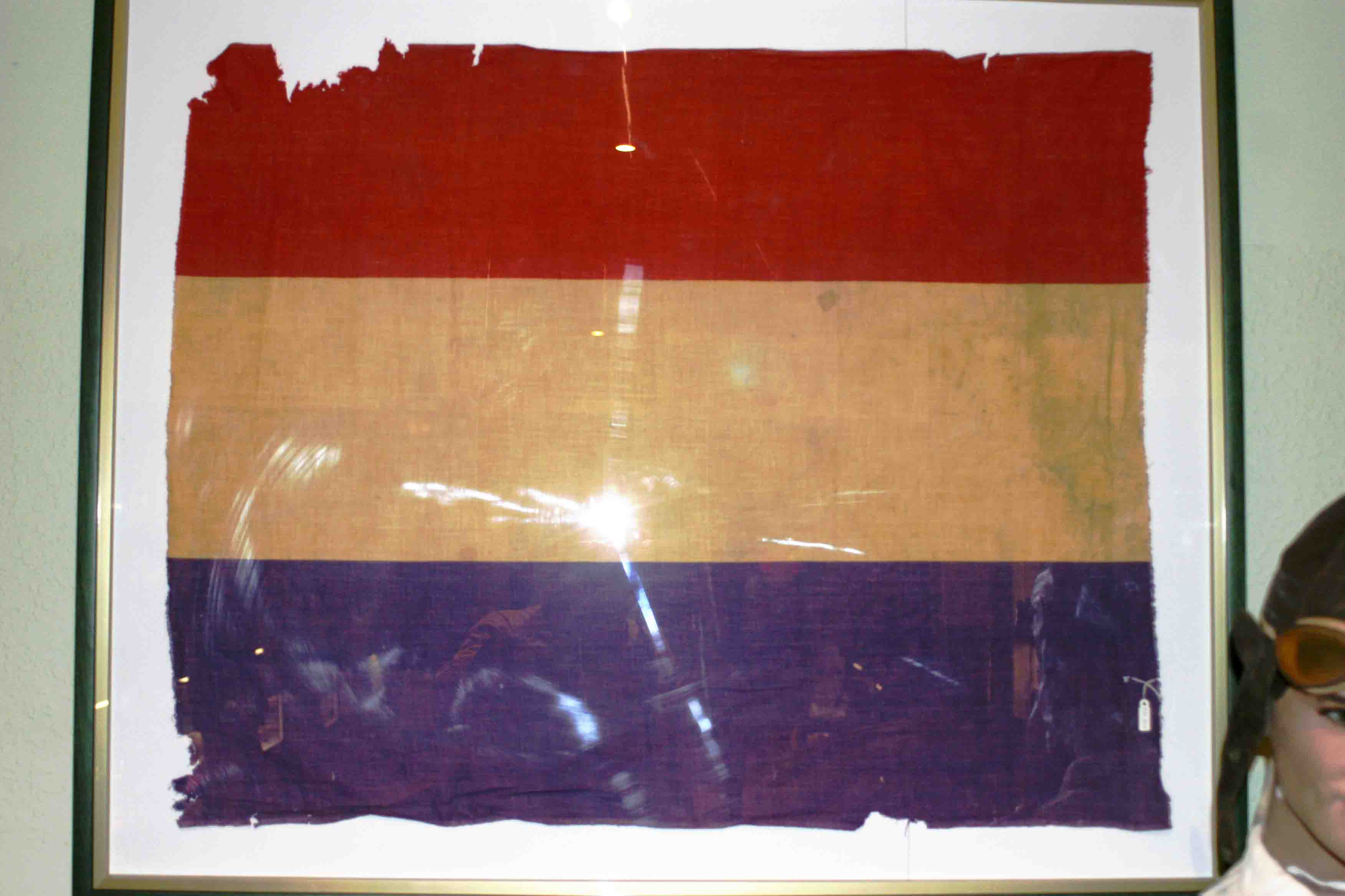 Bandera republicana perteneciente a unidades que participaron en la Batalla del Ebro, España.